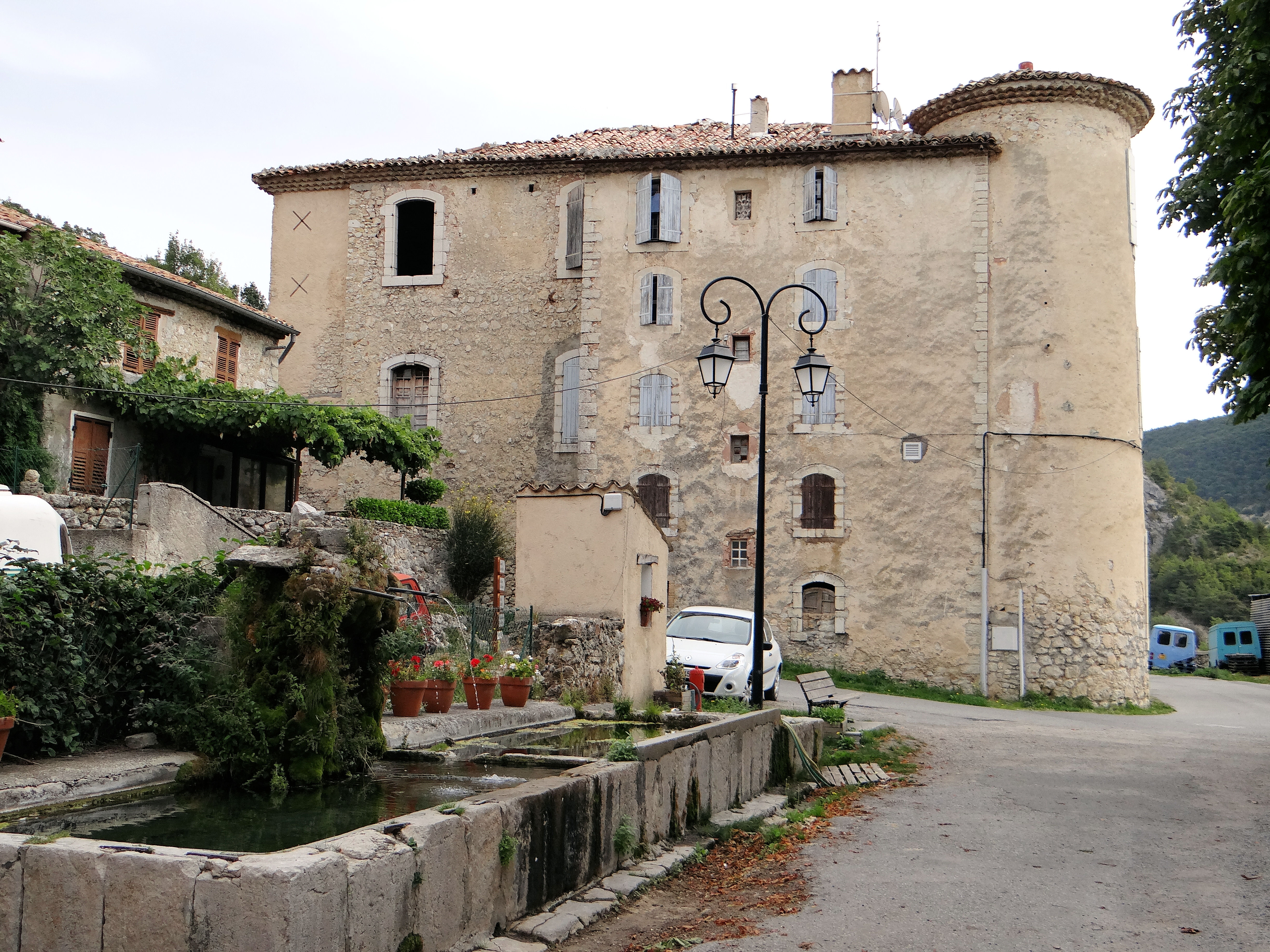 Castellane - Château d'Éoulx - Façade nord et fontaine-lavoir